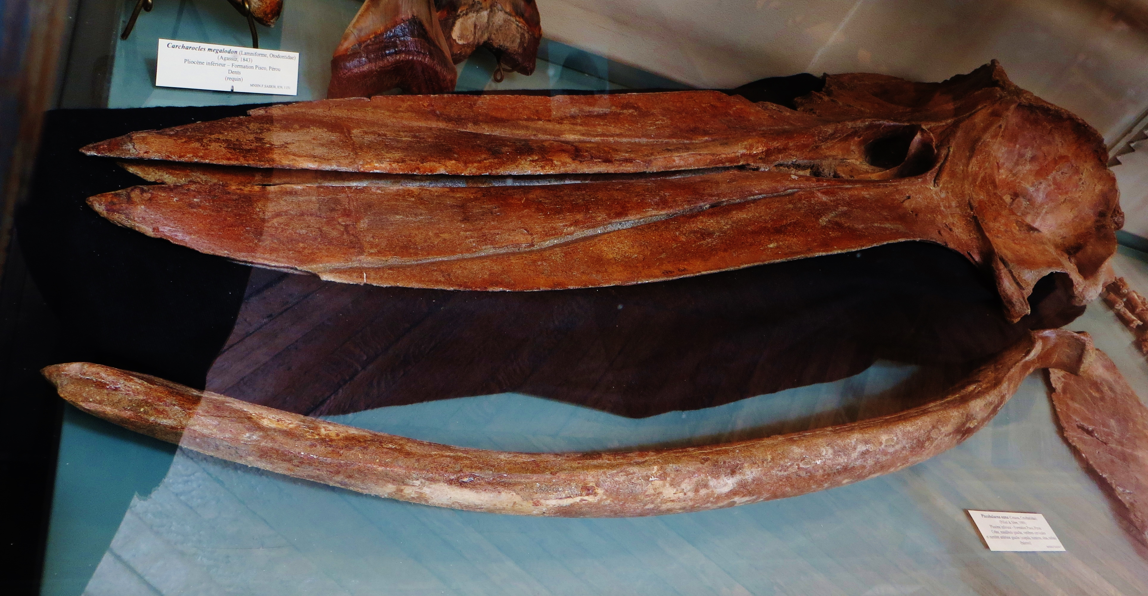 Fossil of Piscobalaena, an extinct mammal- Took the photo at Musee d'Histoire Naturelle, Paris